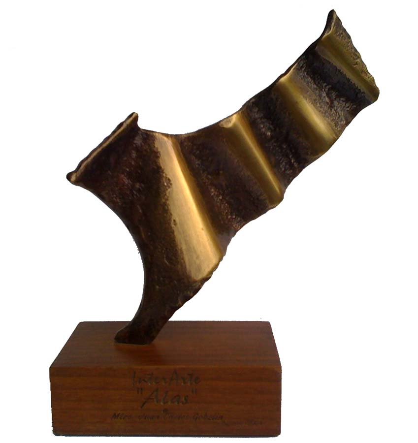 Los Premios ALAS, otorgados en Uruguay por la Asociación Cultural InterArte, son galardones anuales que reconocen la trayectoria y el aporte realizado a la cultura uruguaya.